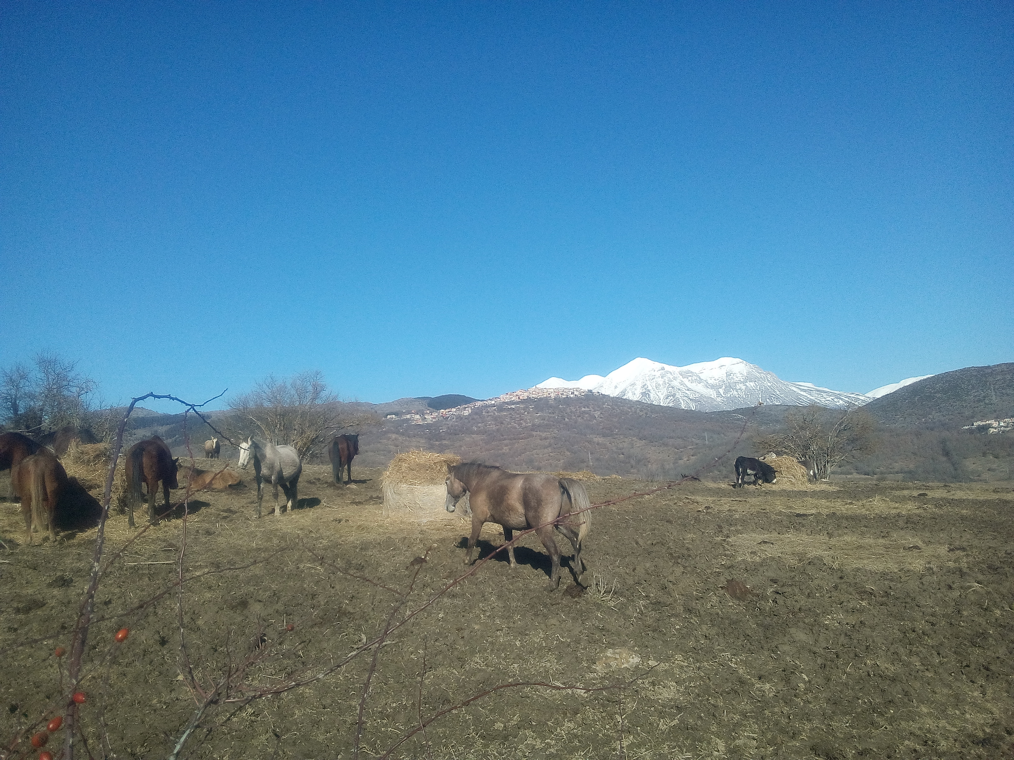 Panoramica di Poggio Filippo